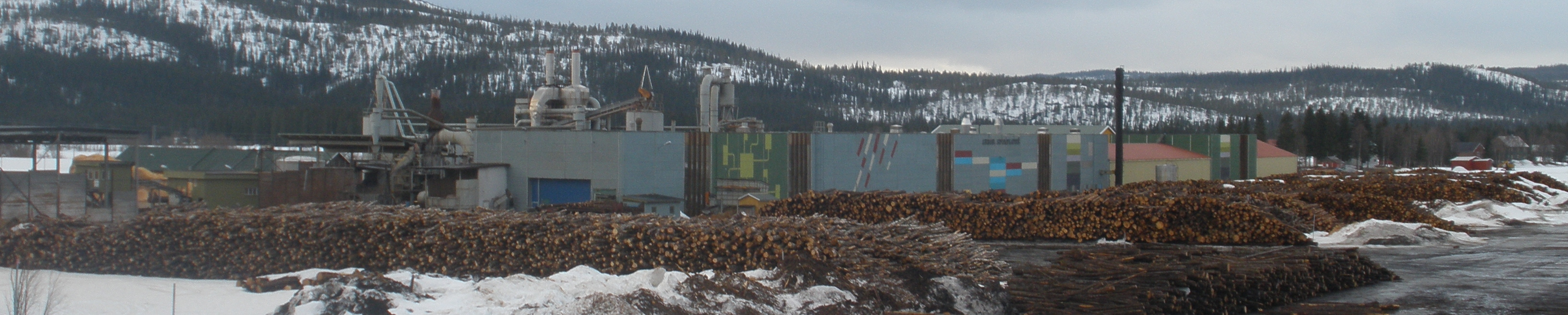 Bilde av Arbor Hattfjelldal